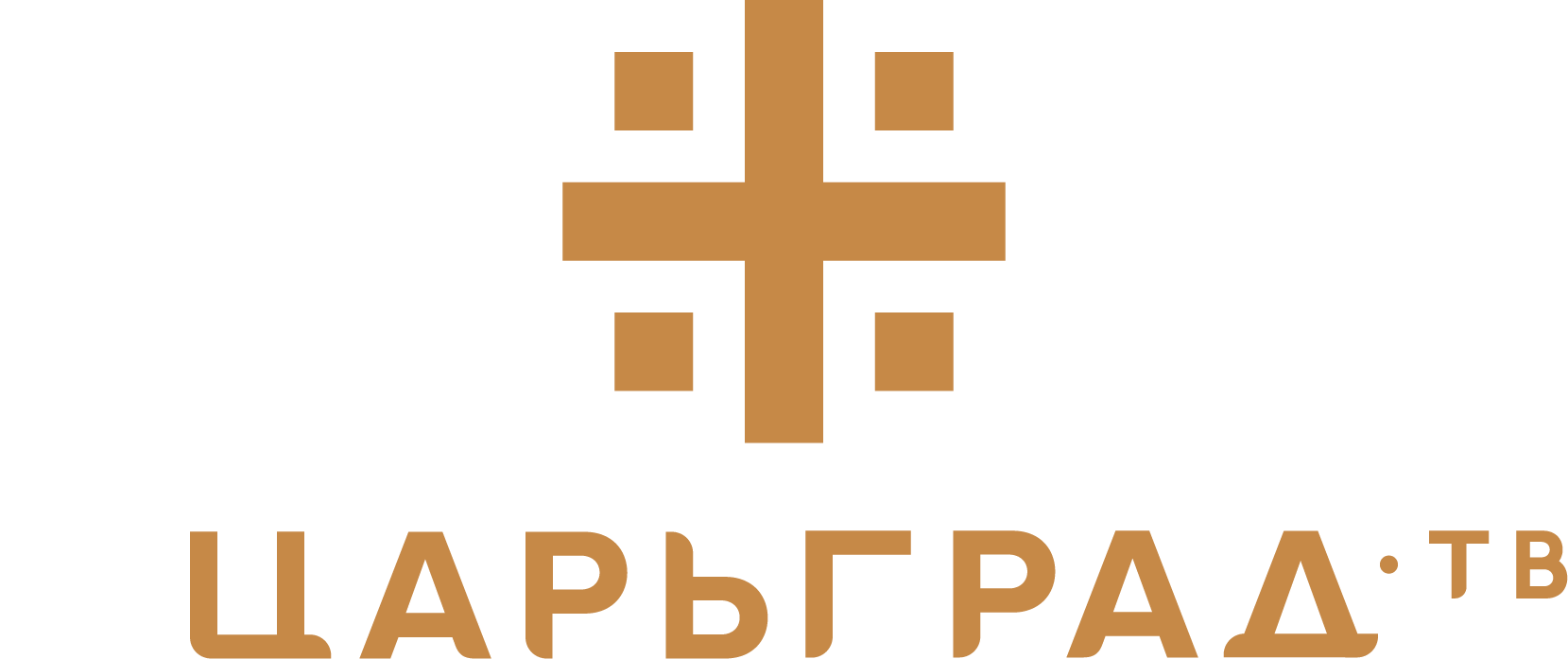 Логотип телеканала Царьград tsargrad.tv